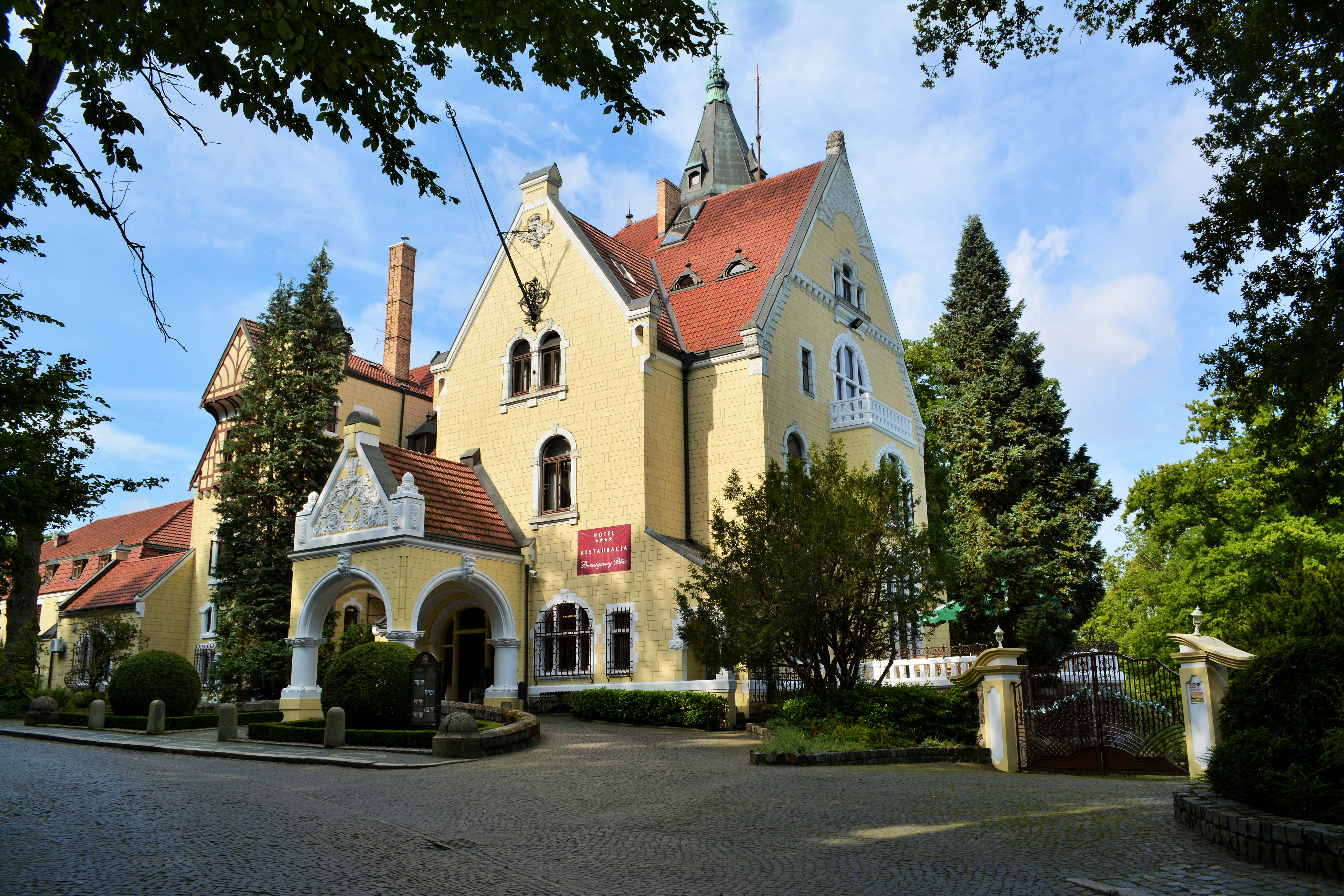 Strzekecino-Bernsteinpalast von der Straßenseite